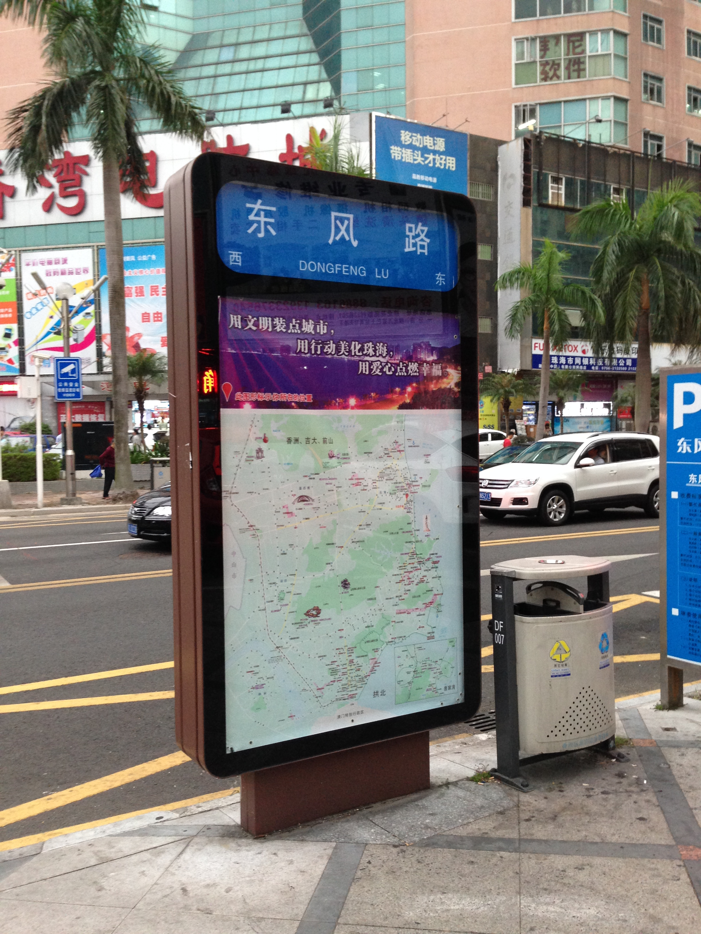 珠海东风路